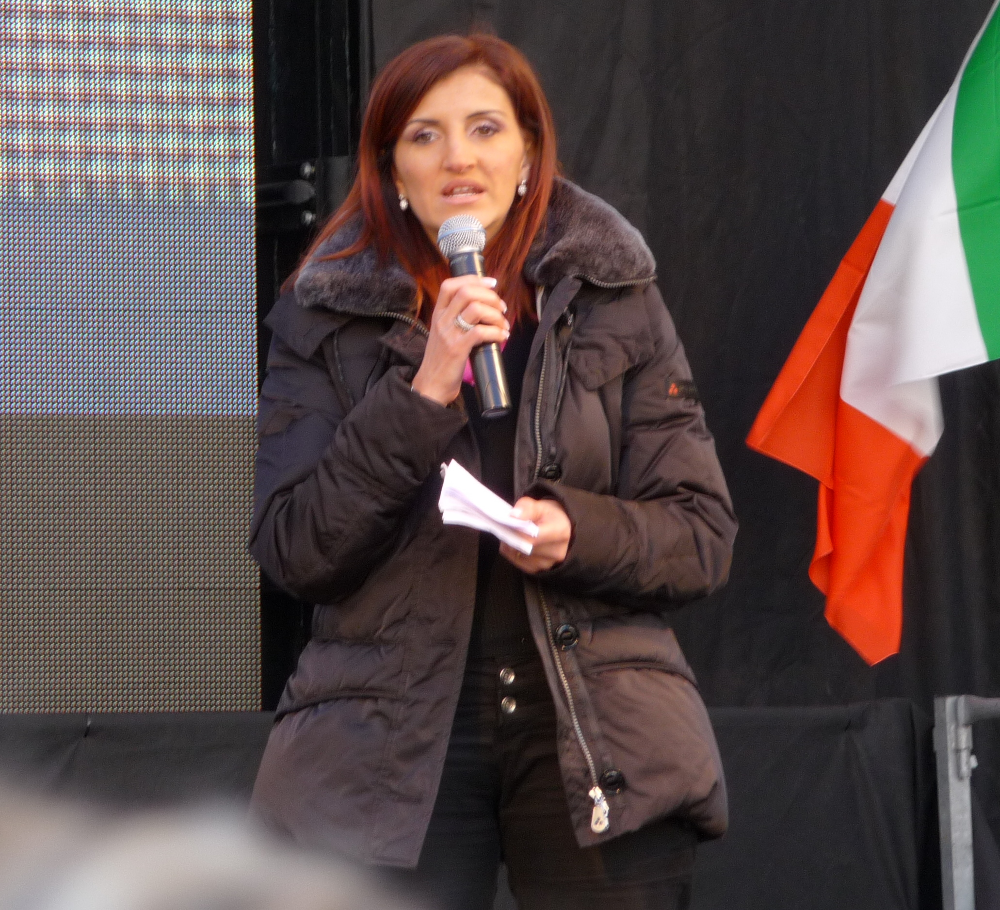 Sonia Alfano alla presentazione del suo libro "La zona d'ombra"